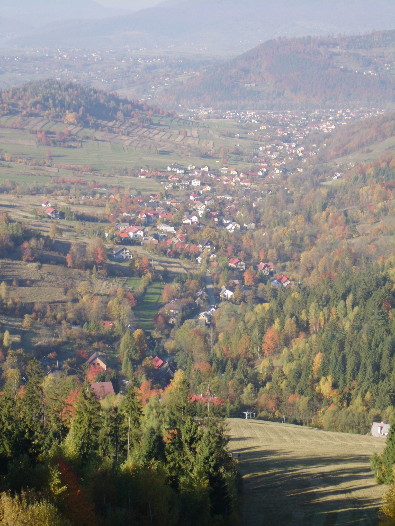 Widok na wieś Przyłęków